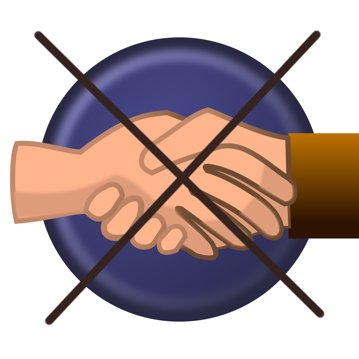 Kein Händeschütteln